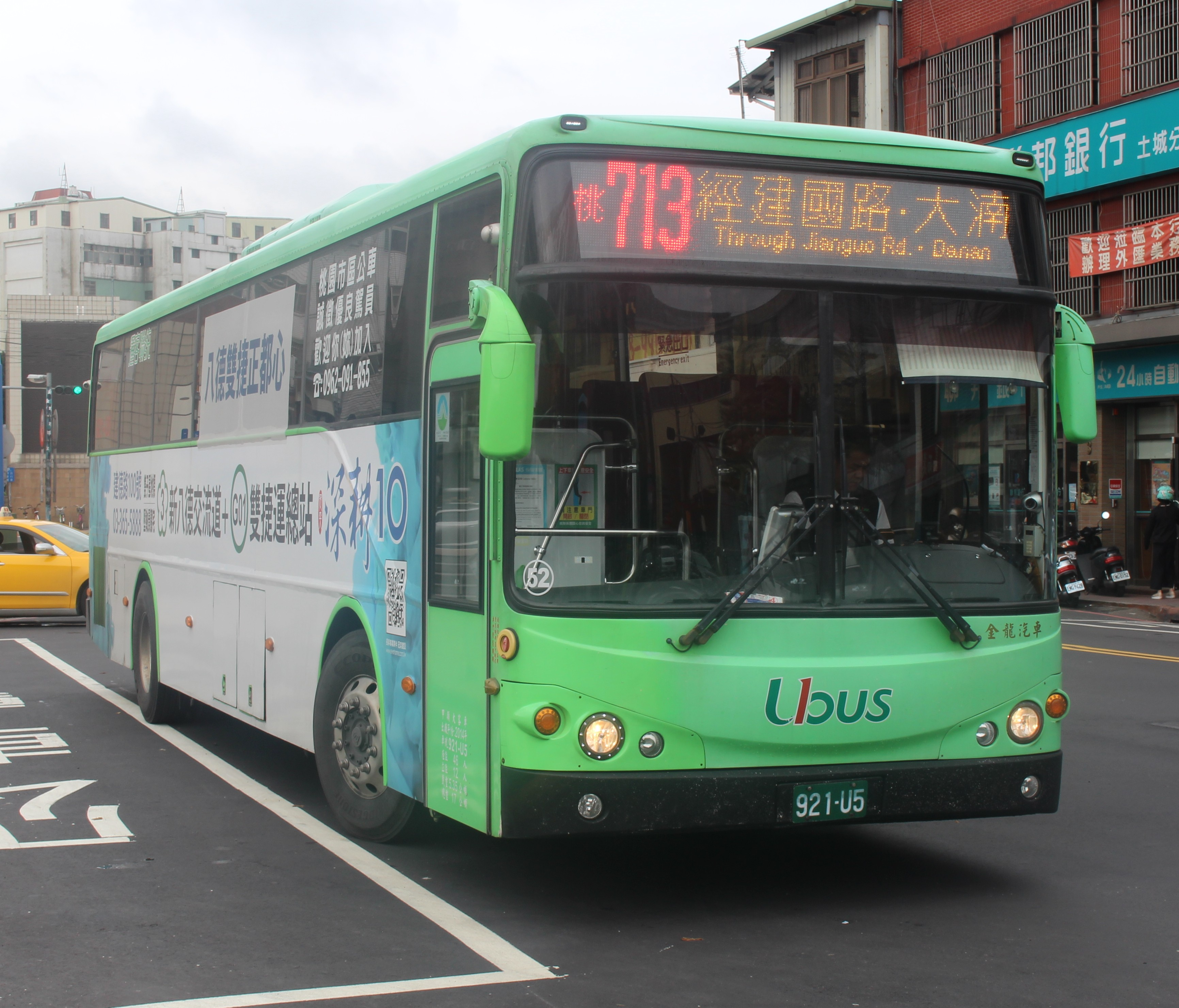 2014 KINGLONG KL6120UH3 921-U5 桃園市公車713路